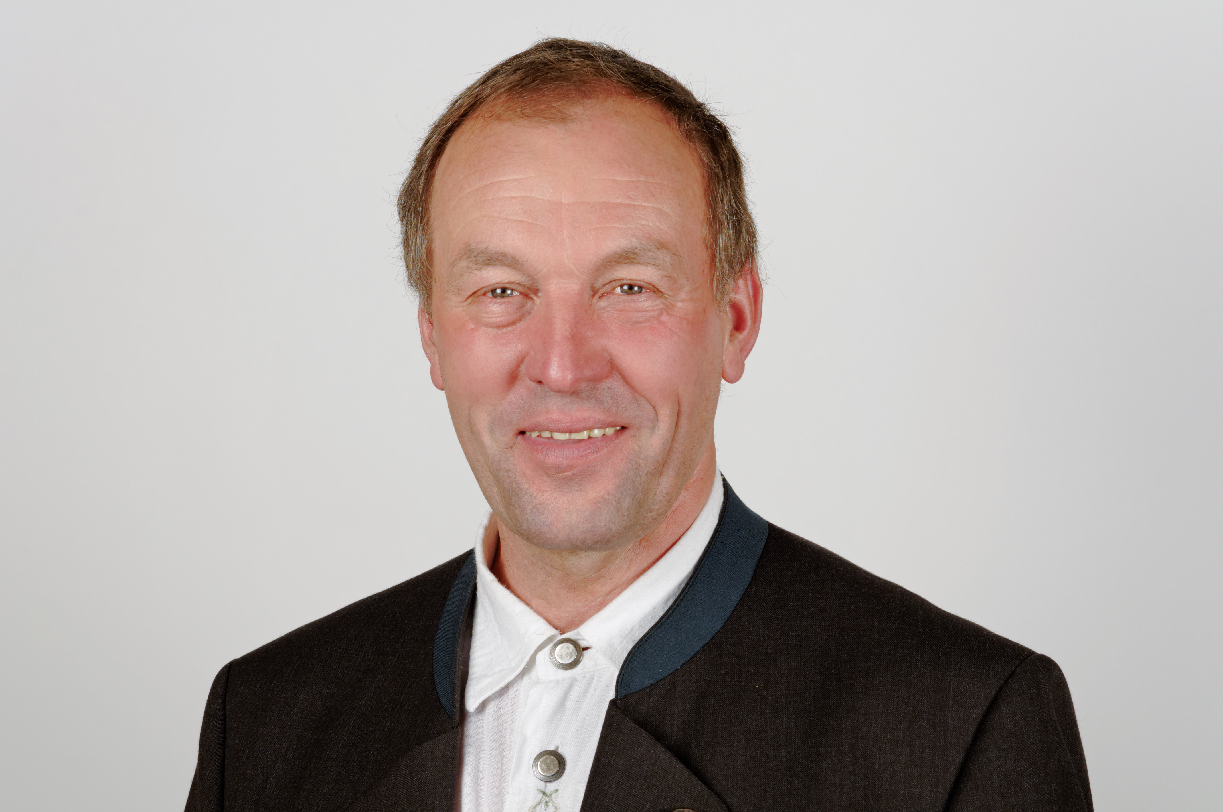 Landtagsprojekt Bayern